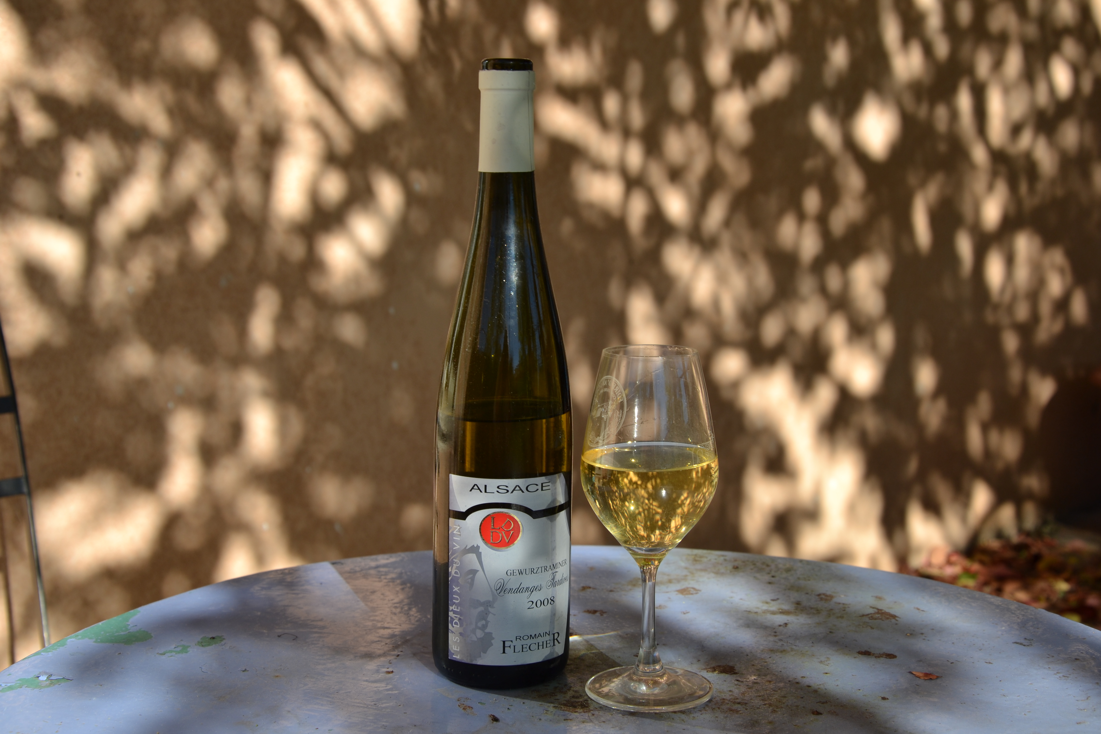 Bouteille de vin d'Alsace en vendange tardive 2008